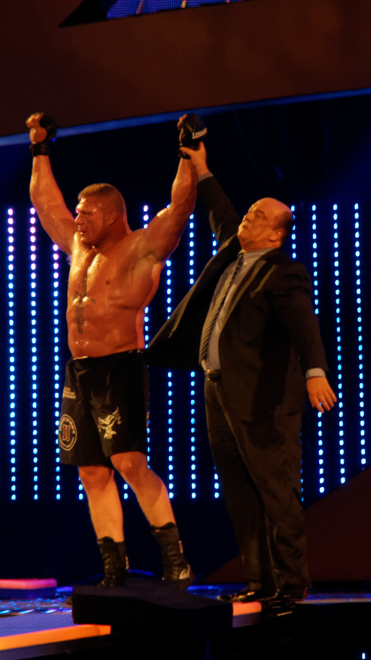 2014-04-06_20-58-03_NEX-6_0019_DxO